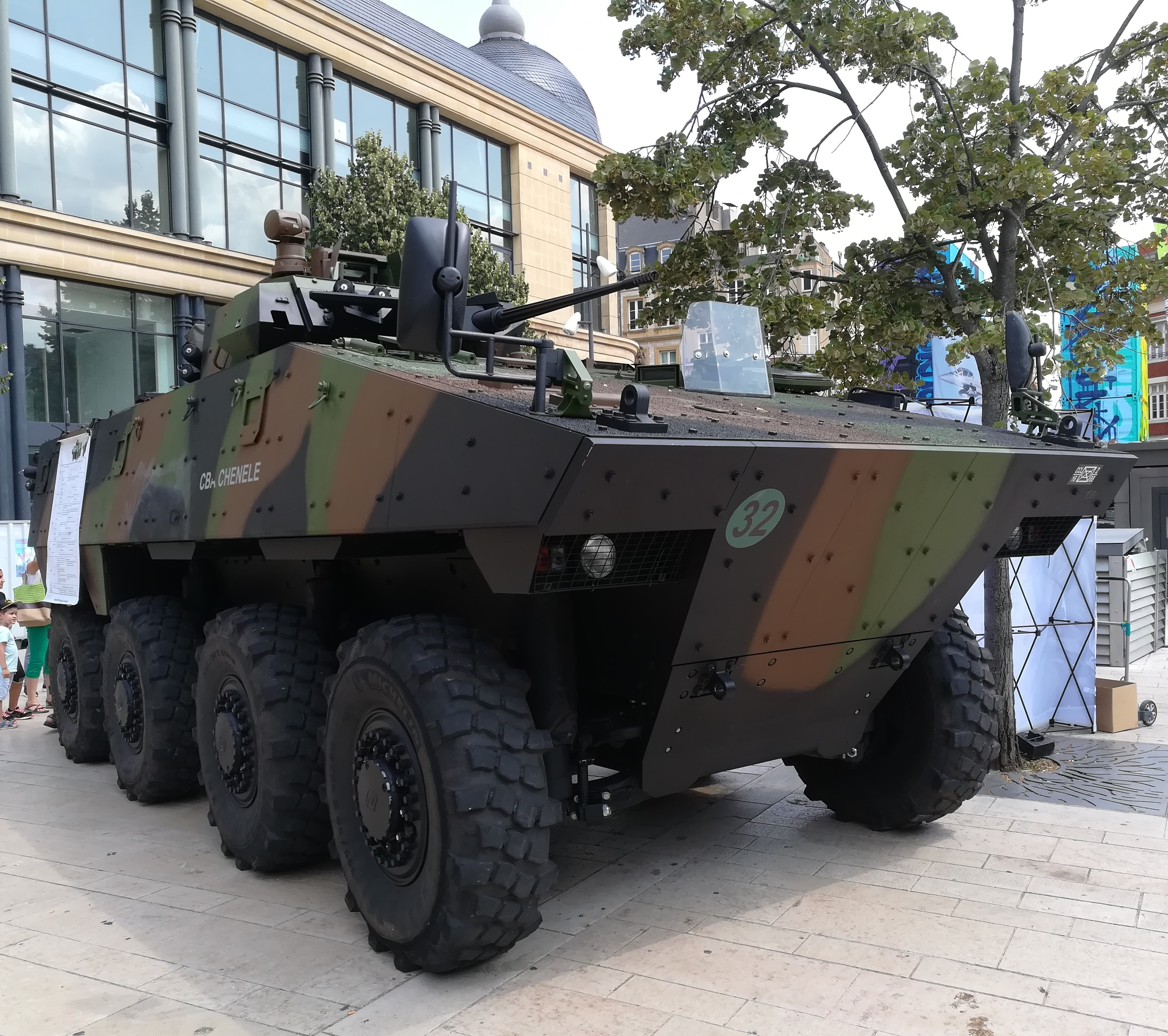 VBCI à la Place de la République de Metz le 13 juillet 2018